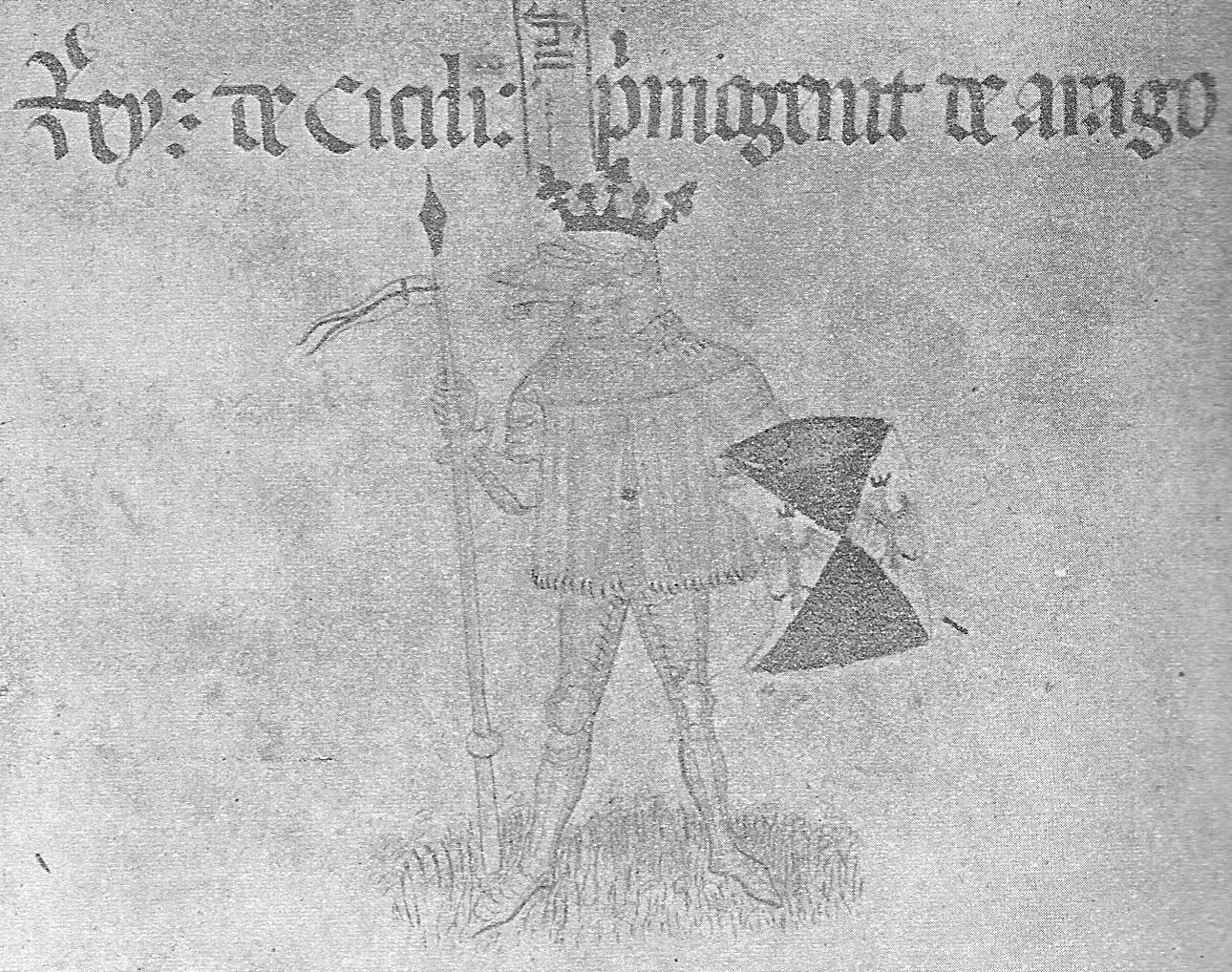 Rotlle genealògic del Monestir de Poblet